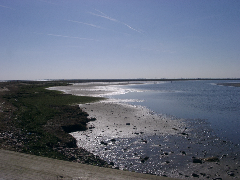 Salzlagune im Beltringharder Koog, 21.03.2005